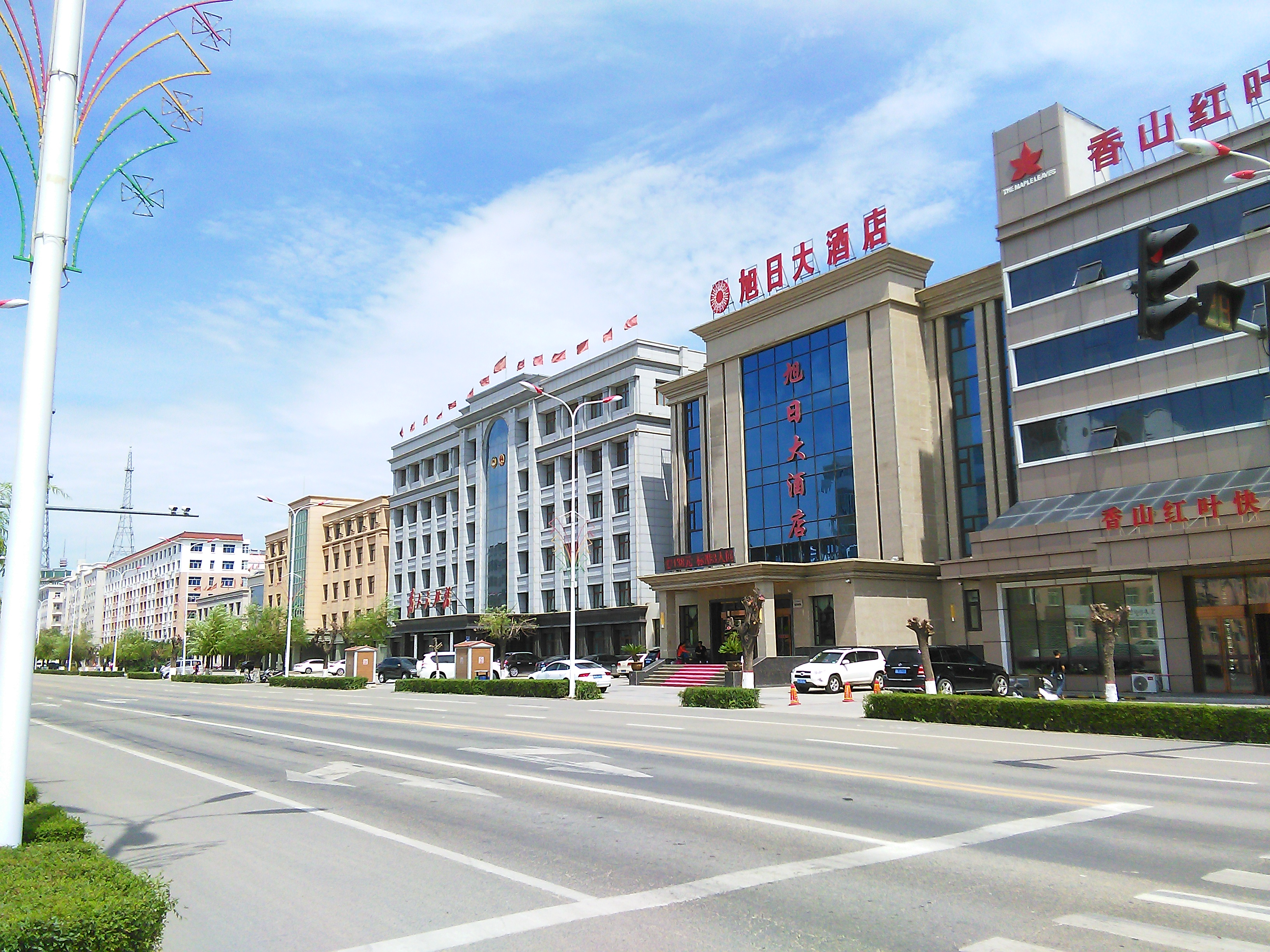 中文（中国大陆）: 泰来县八一路街景2017夏